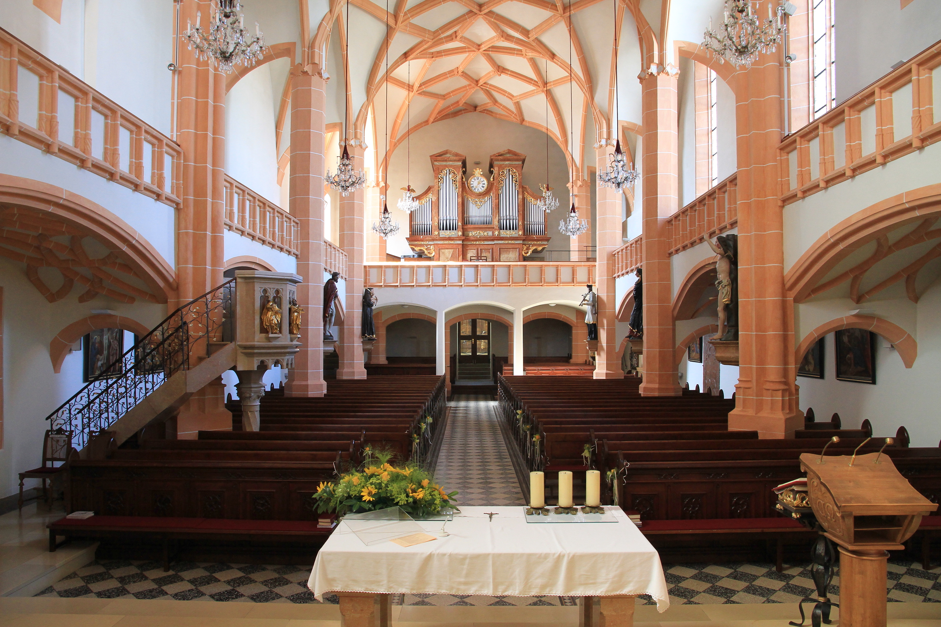 Blick Richtung Orgelempore in der katholischen Pfarrkirche hl. Michael der niederösterreichischen Marktgemeinde Steinakirchen am Forst.